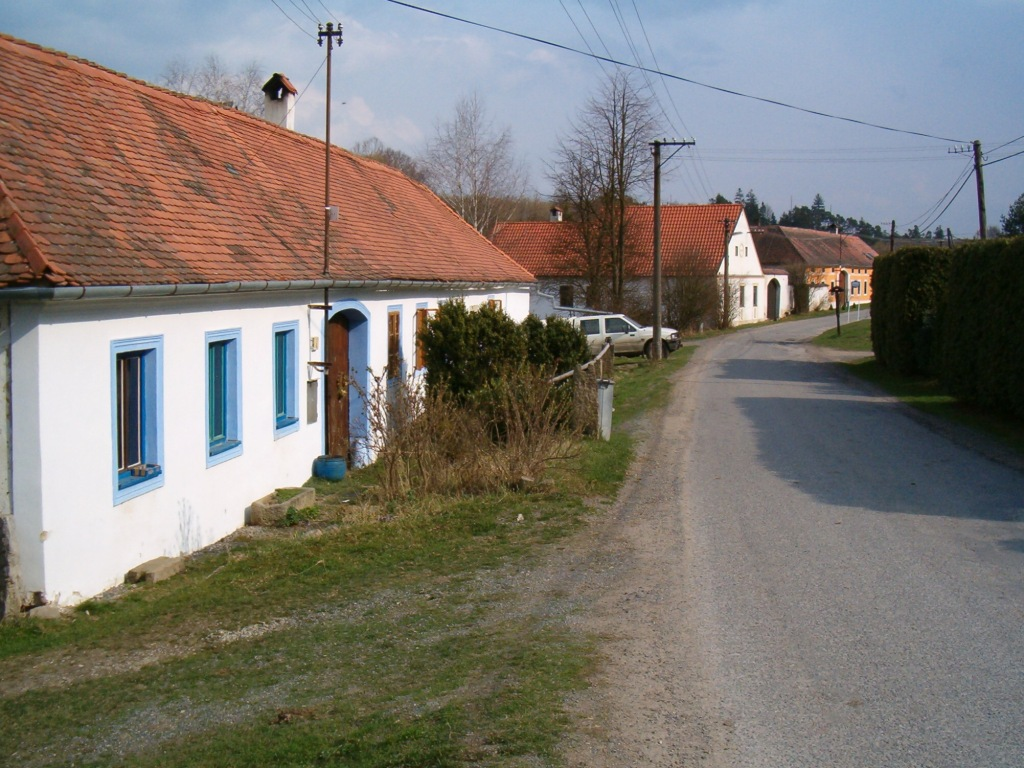 Česky: Náves v Modleticích (Písečné)